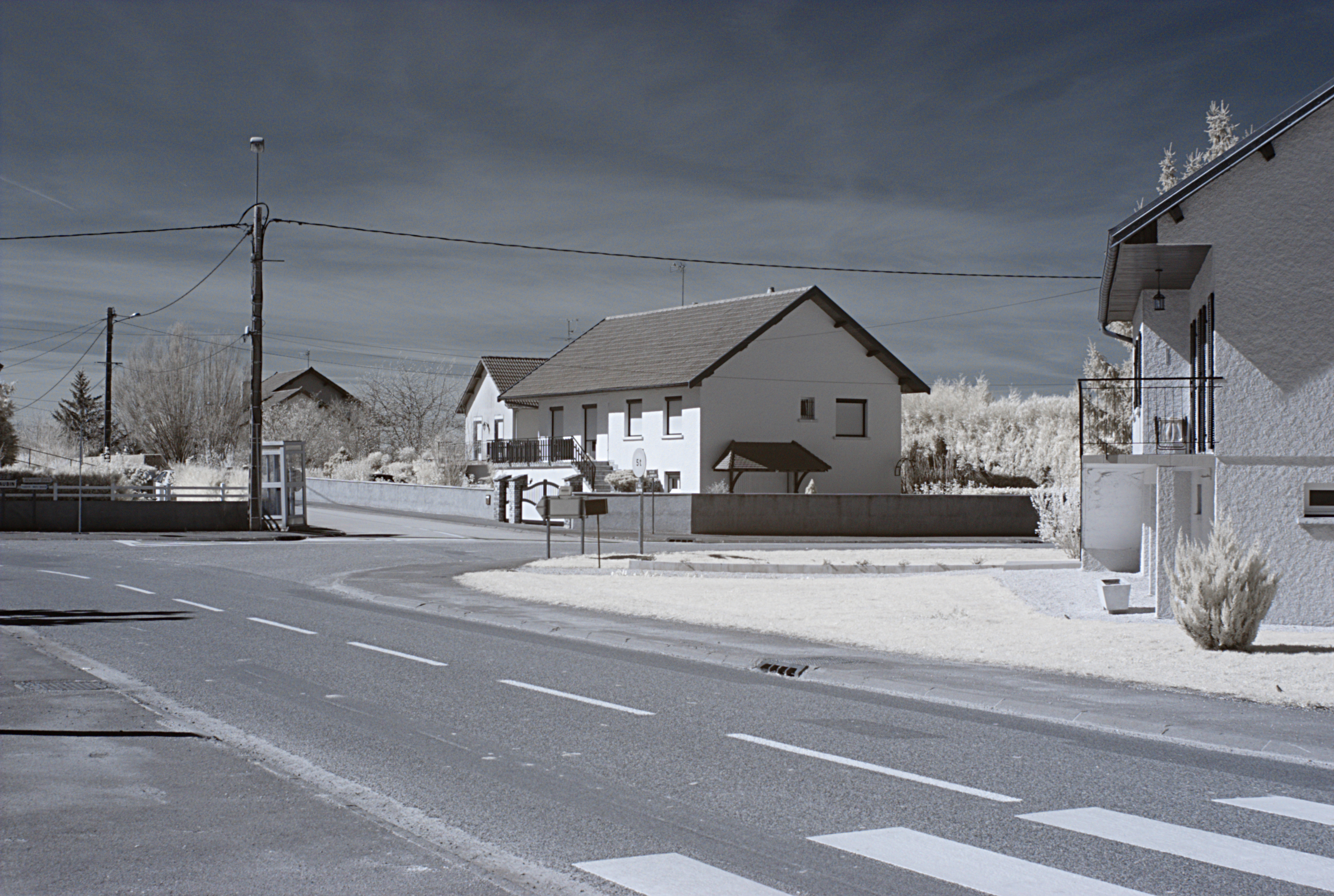 Rue du Centre, Aumur (Jura, Franche-Comté, France) photographié avec un filtre infrarouge 720 nm.